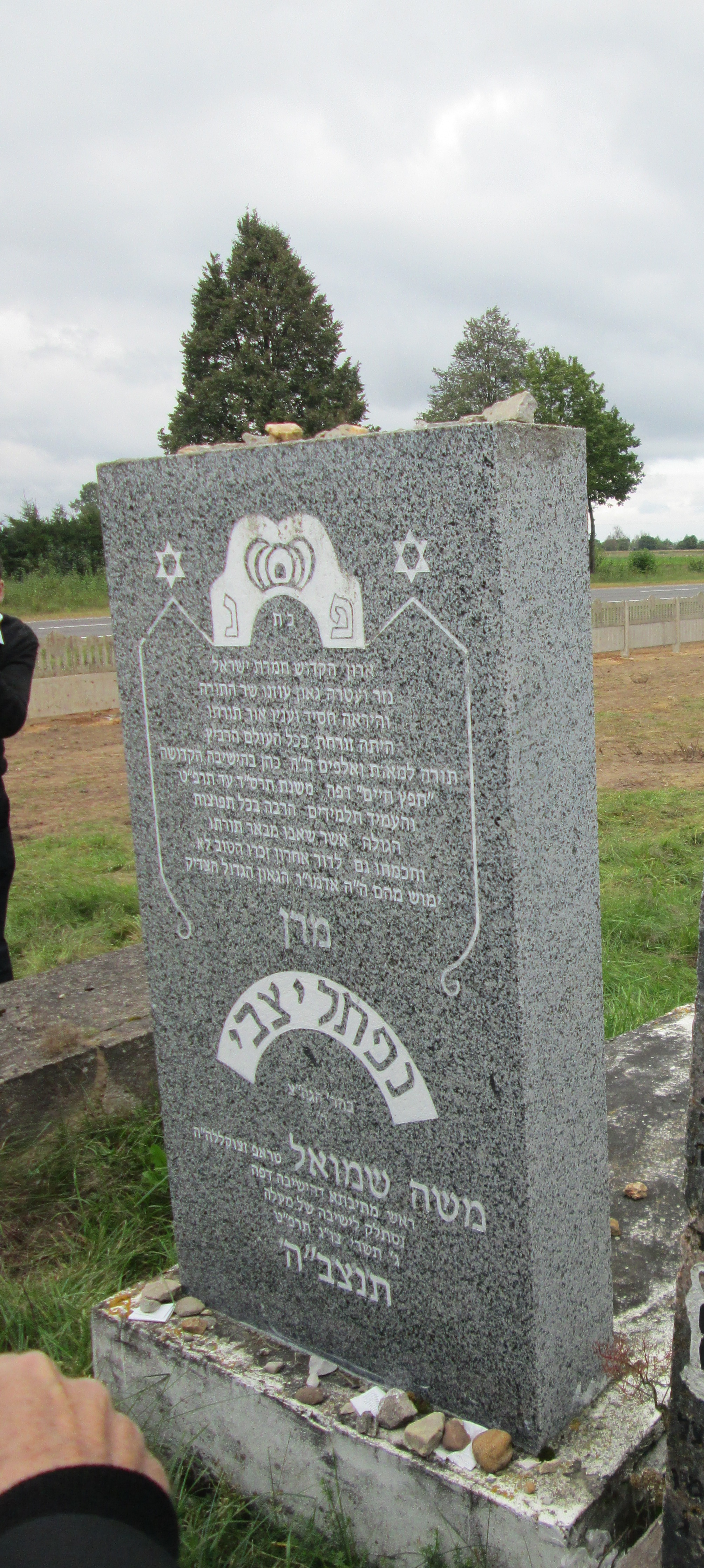 מצבת ר' נפתלי צבי טרופ